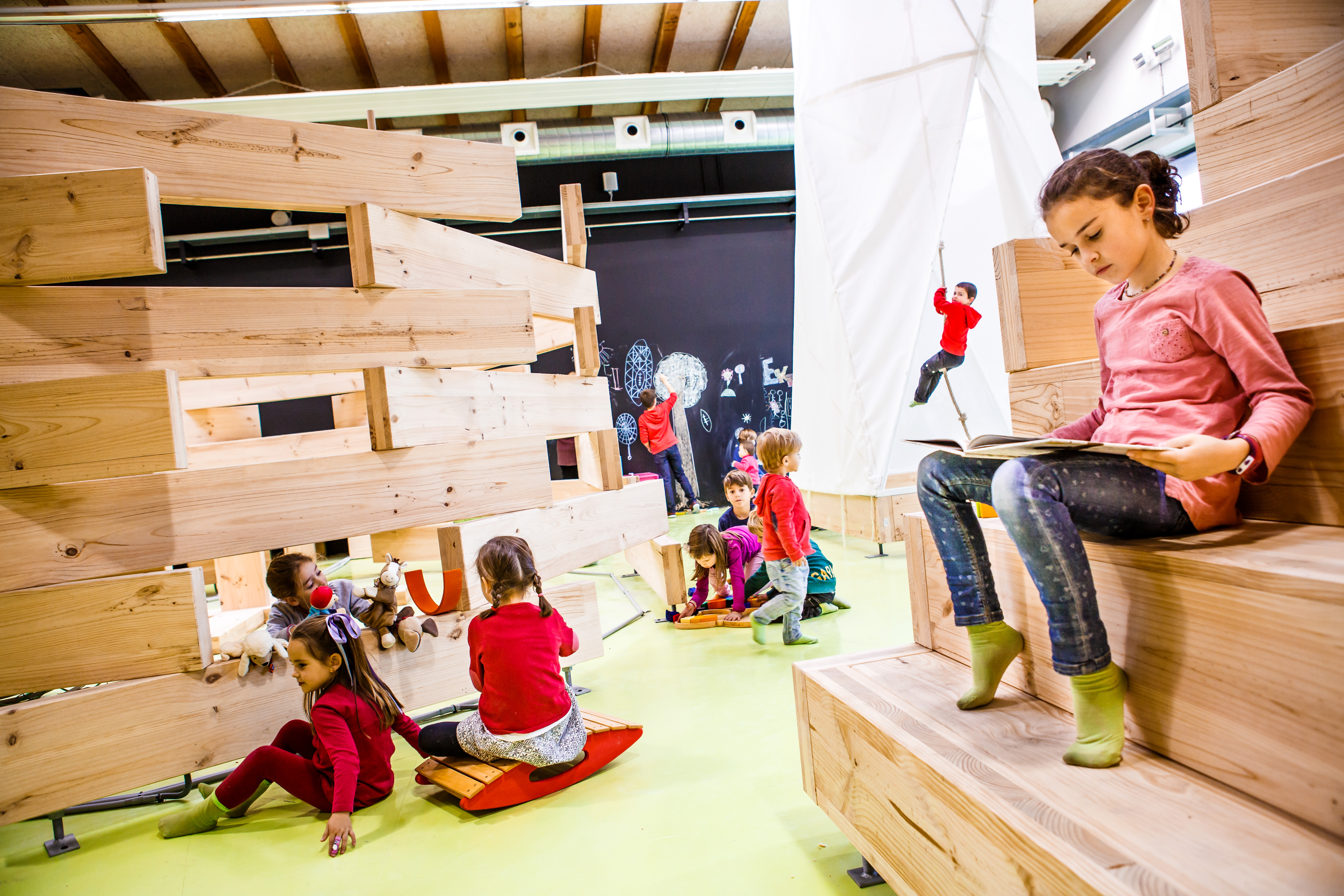 Haur Parkea_Parque infantil de Kutxa ekogunea